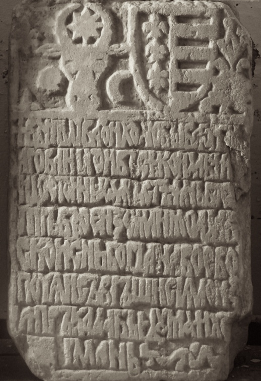 Pisanie (1479) de la Cetatea Albă însemnând: În zilele cuviosului și de Hristos iubitorului și de Dumnezeu dăruitului și de toată lauda vrednicului Ioan Ștefan voevod, domn a toată Țara Moldovei, fiu al lui Bogdan voevod, s-a început și s-a sfârșit acest zid, pe vremea pârcălabilor Duma și Hărman.